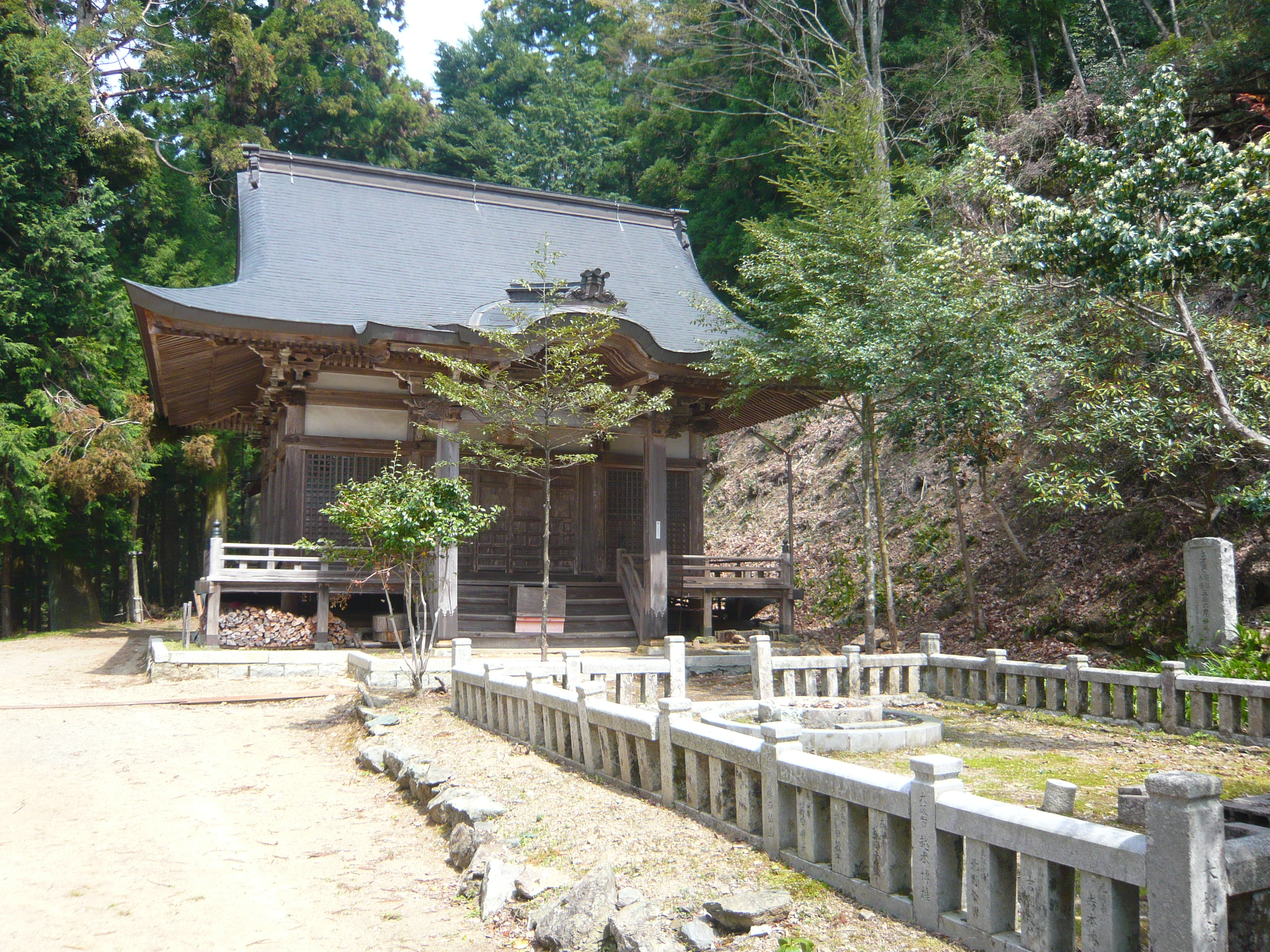 鳳閣寺 黒滝村鳥住 Hōkakuji 2011.4.26